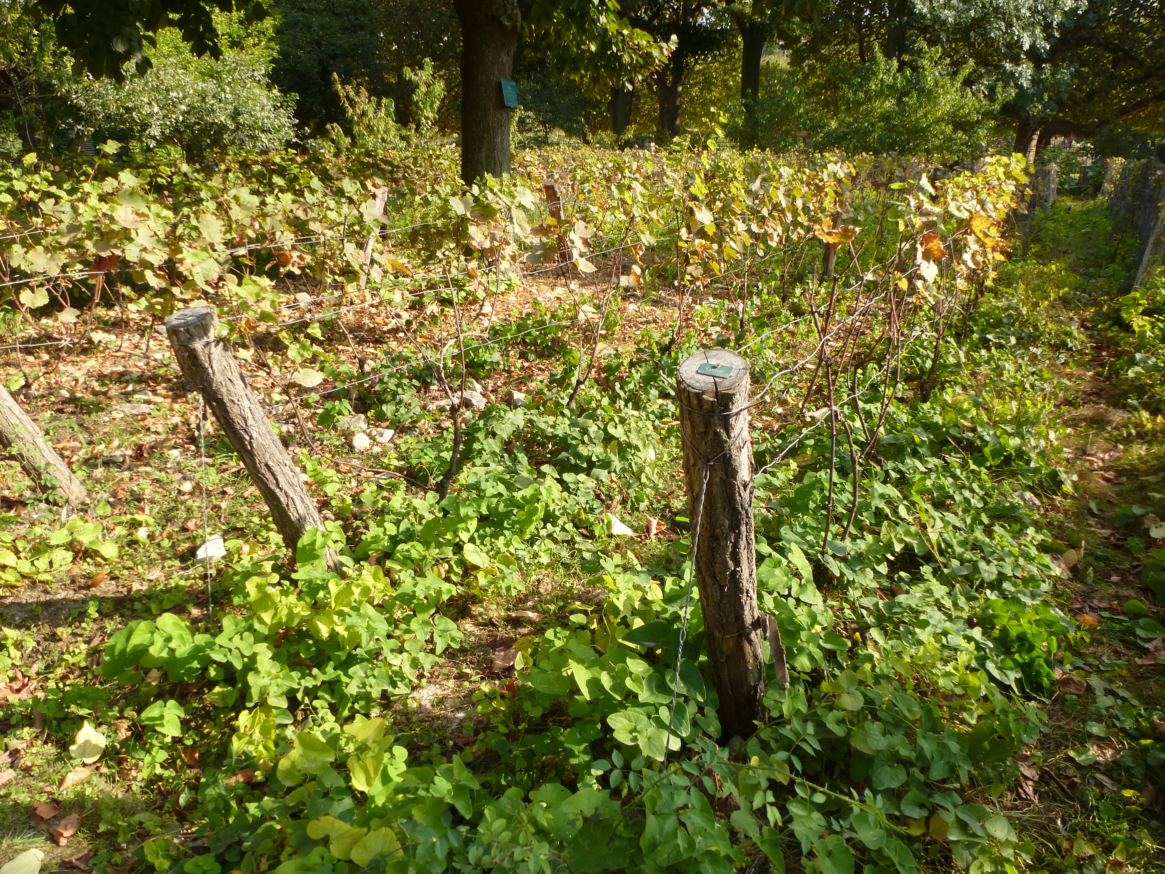 Aristoloche des vignes (Aristolochia clematitis) et Vignes (Vitis vinifera), au jardin écologique du Jardin des plantes de Paris. Muséum national d'Histoire naturelle. 75005 Paris, France.